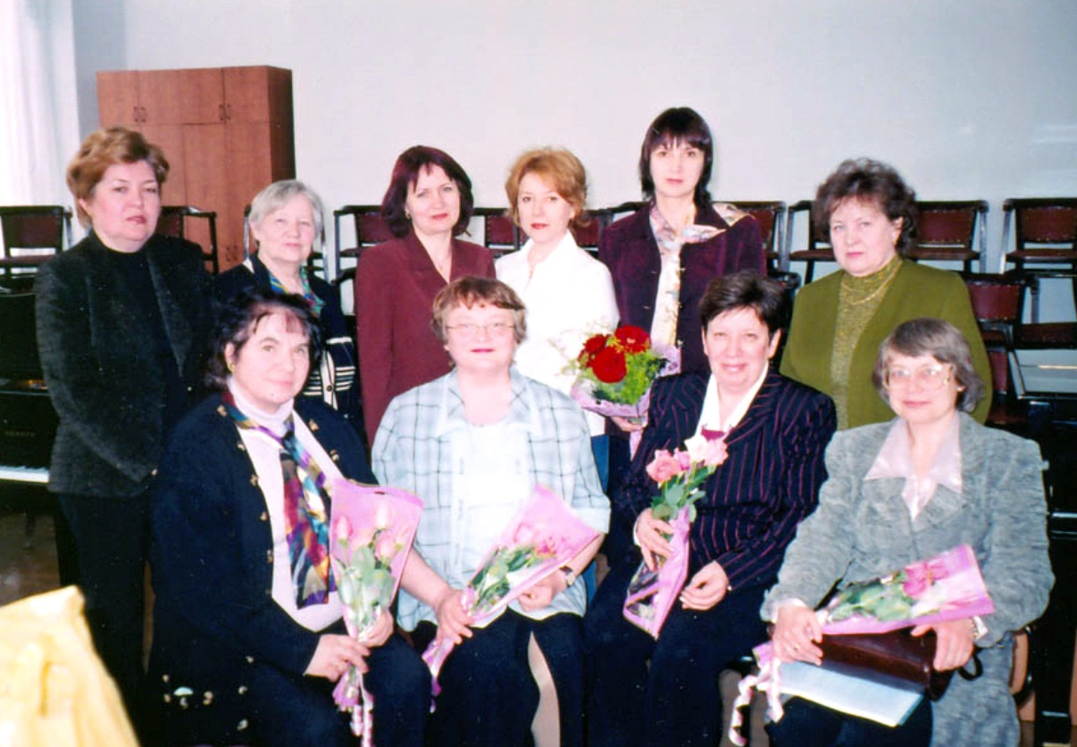 На снимке изображены участники III Всероссийской Научно-практической конференции «Музыкальное содержание наука и педагогика», Уфа, 26-29 апреля 2004 г. Слева направо в первом ряду: В.Н. Холопова, Л.Н. Шаймухаметова, Г.Р. Тараева, Л.П. Казанцева; во втором ряду - сотрудники ЛМС: Н.М. Кузнецова, Р.Х. Исламгулова, А.И. Асфандьярова, П.В. Кириченко, И.В. Алексеева, Н.Ф. Гарипова Источник Снимок сделан в Лаборатории музыкальной семантики Уфимской государственной академии искусств им. Загира Исмагилова (Уфа, Ленина, 14) Время создания 27 апреля 2004 года Автор фотограф (автор) снимка «Laboratory_of_musical_semantics.jpg», сотрудник Лаборатории музыкальной семантики.